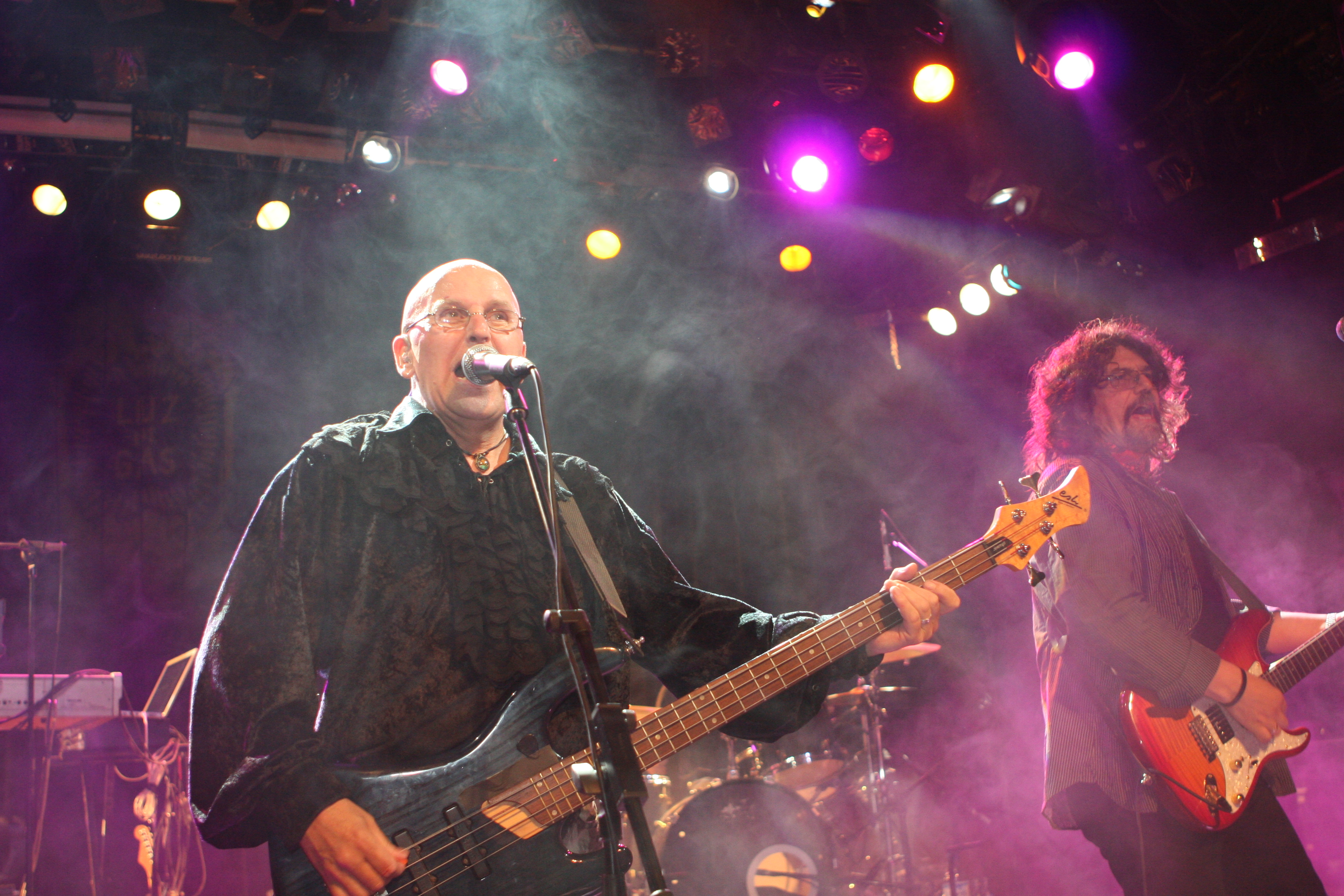 La Electric Light Orchestra en la sala Luz de Gas de Barcelona el 6 de Junio de 2008.